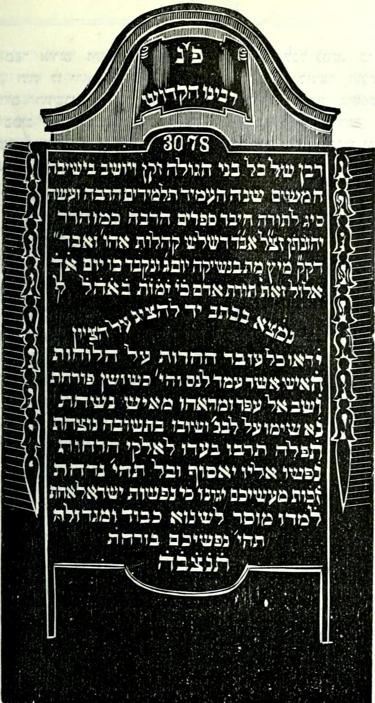 מצבת הרה"ג וכו' מוהר"ר יהונתן אייבשיטץ זצ"ל.